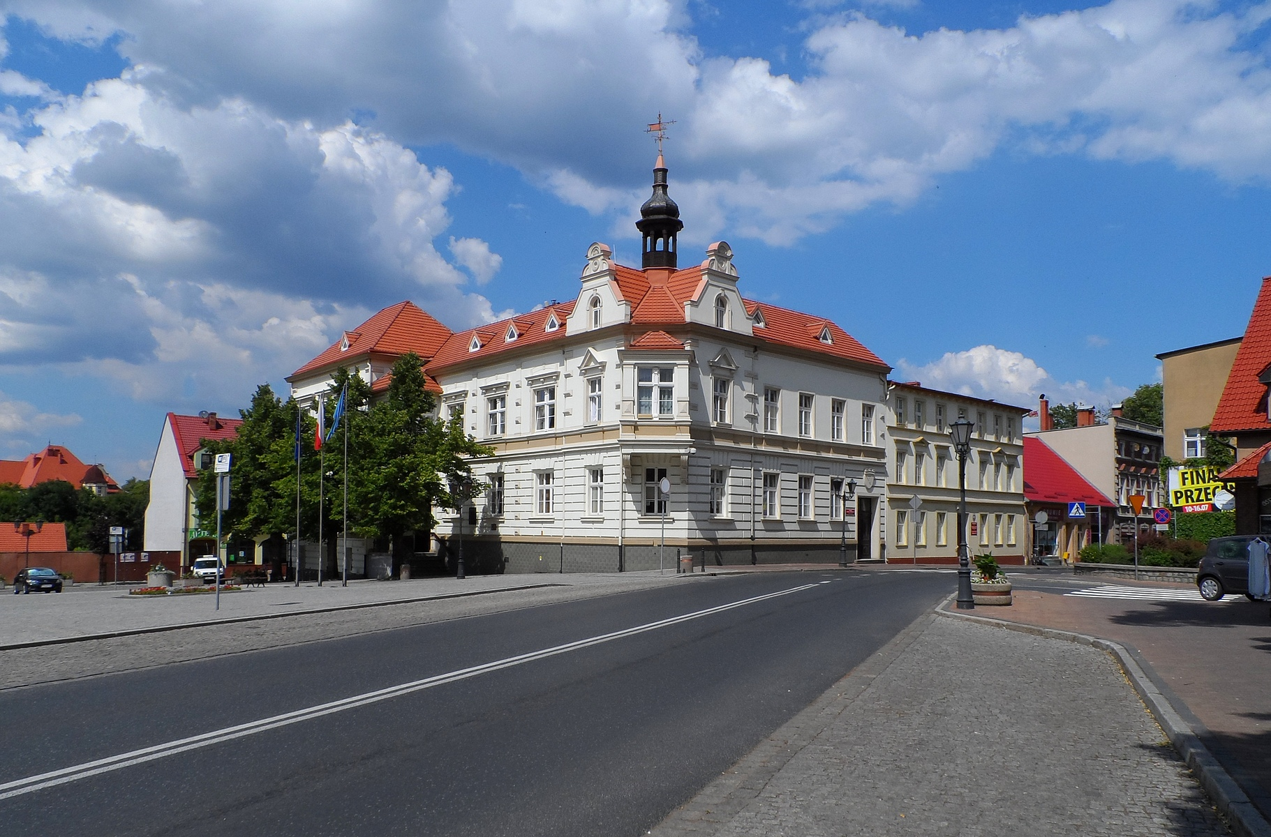 Wałcz, ratusz, 1888-1890, 1936-1937